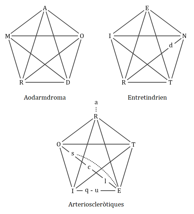 Exemples de aodarmdromes que contenen el subgrup K5